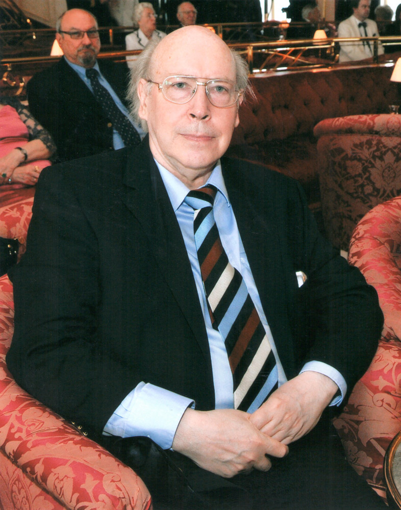 Portrait von Prof. Dr. Siegmund Helms